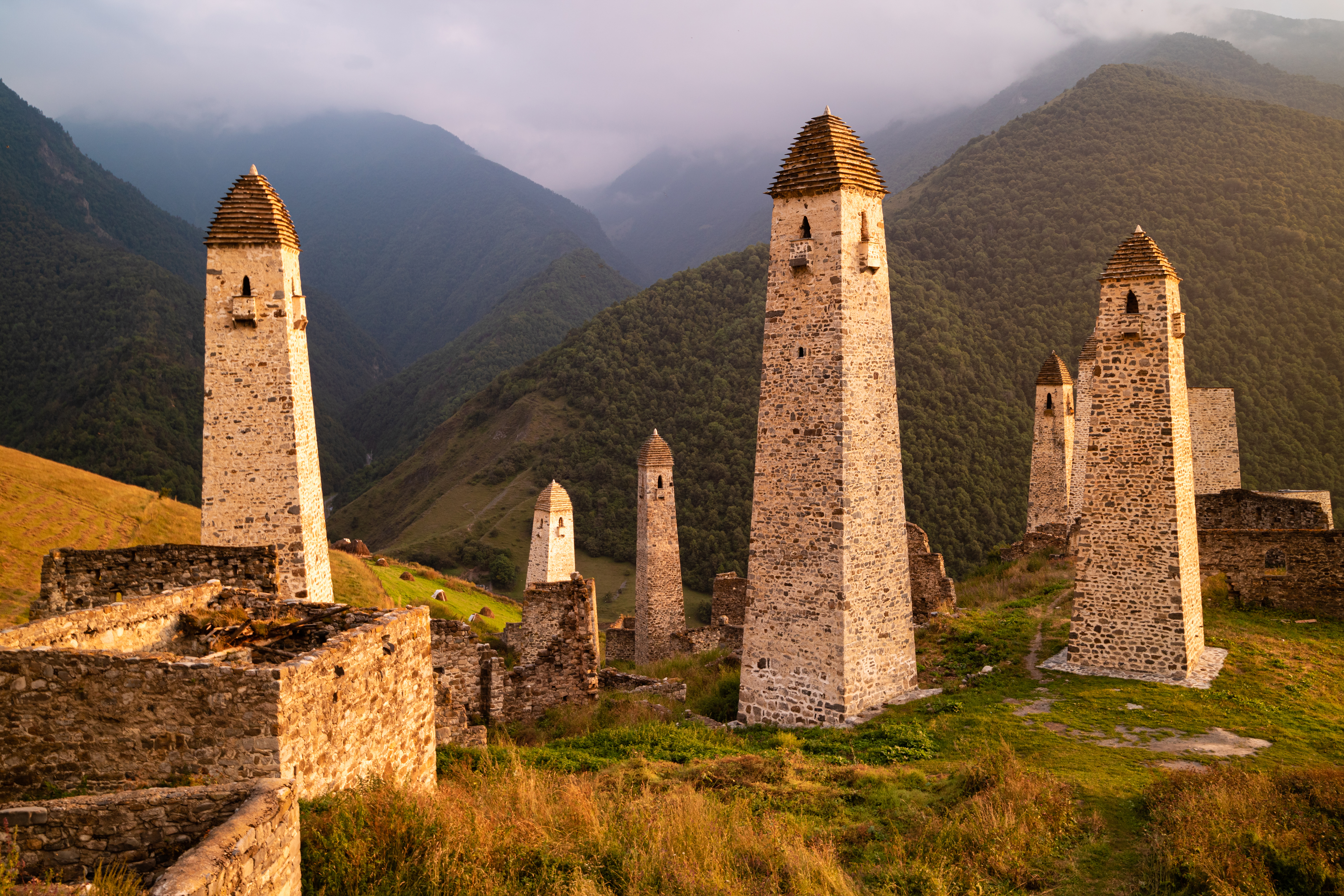 Ингушский заказник: Заказник расположен в горах Северного Кавказа в бассейнах рек Армхи, Асса, Фортанга в Джейрахском и Сунженском районах, Ингушетия This image is related to the protected area of Russia number 0600001